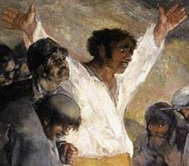 España, camisa blanca.